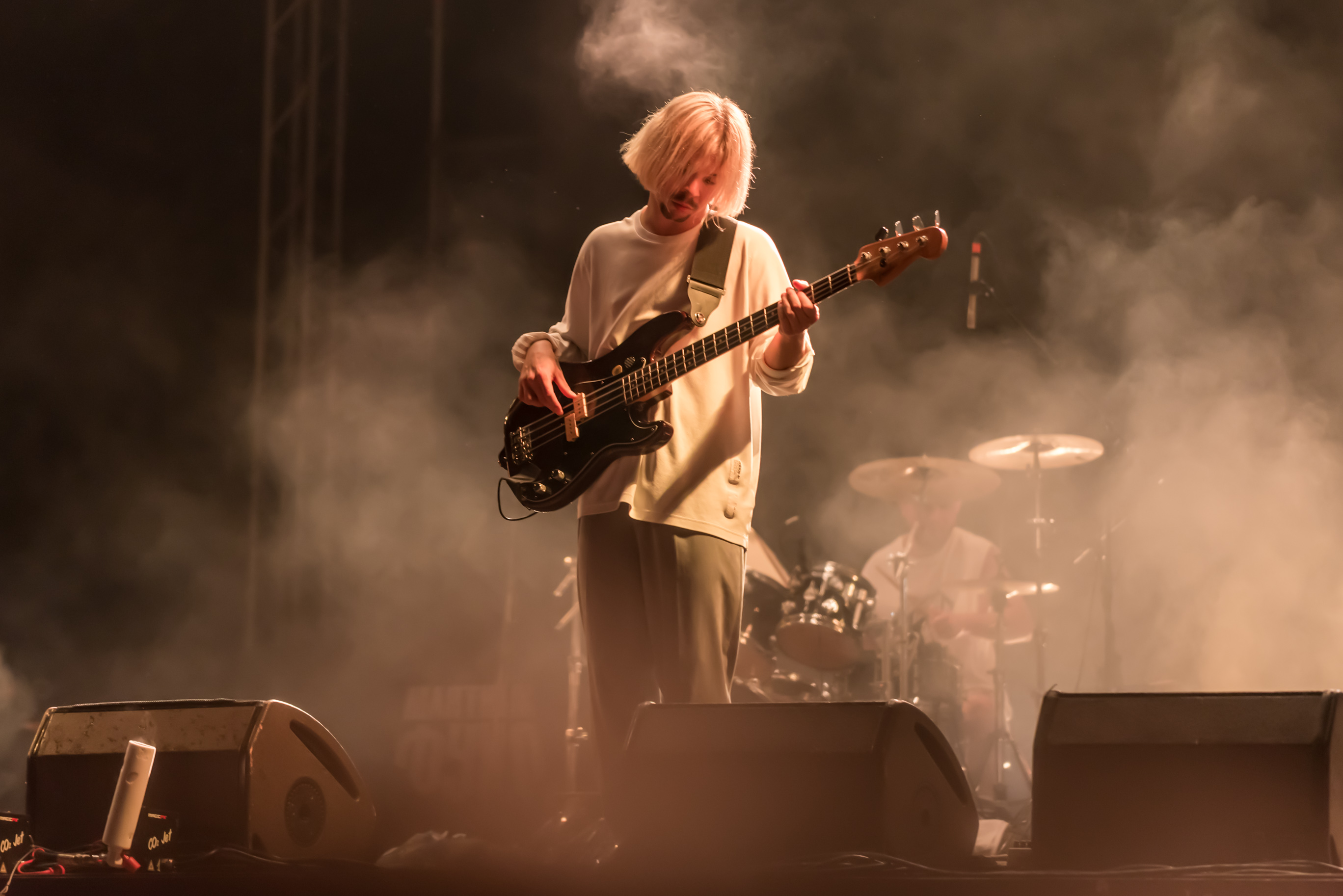 «Пошлая Молли» на фестивале «Маятник Фуко»